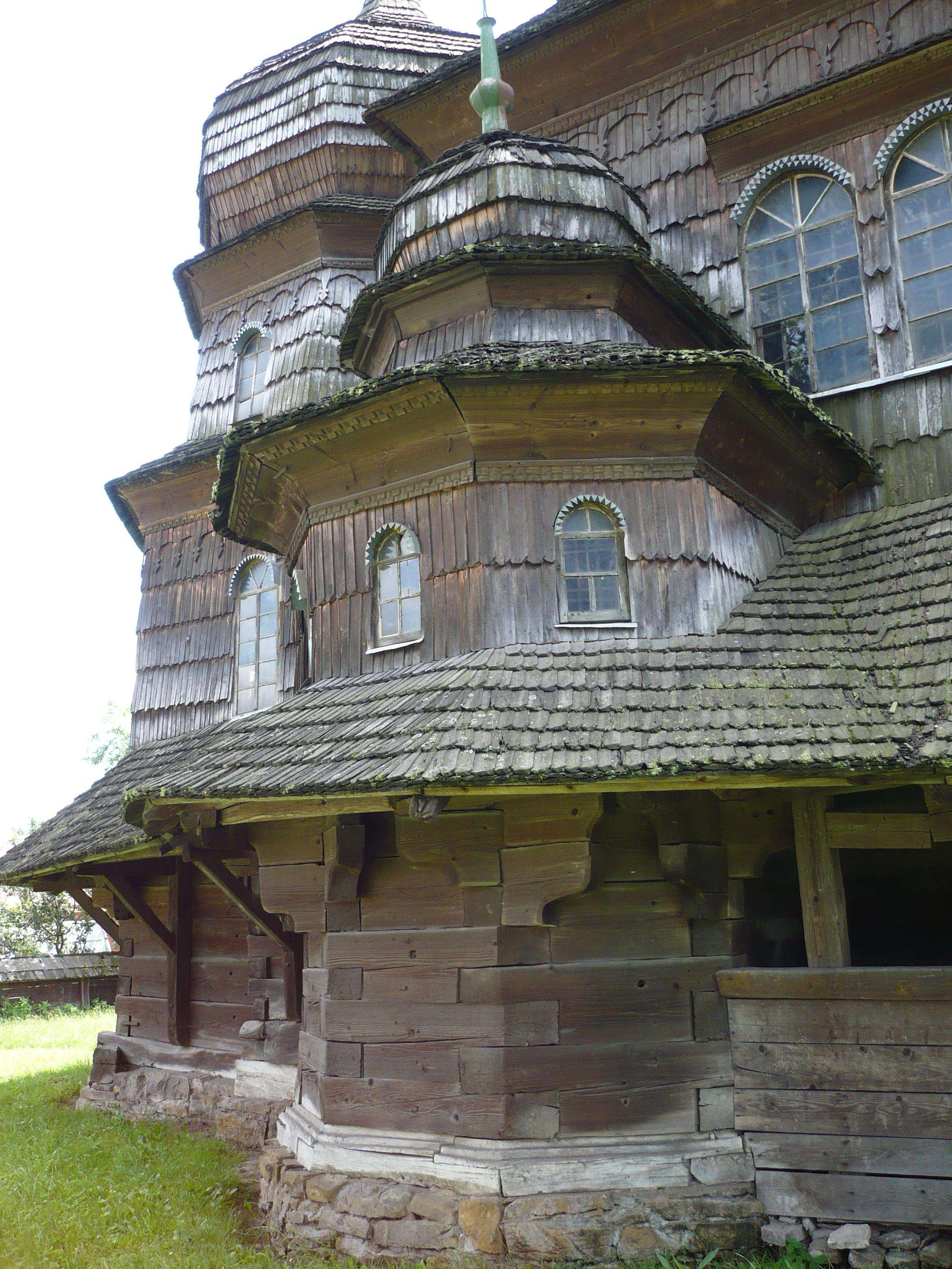 Cerkiew pw. św. Jura